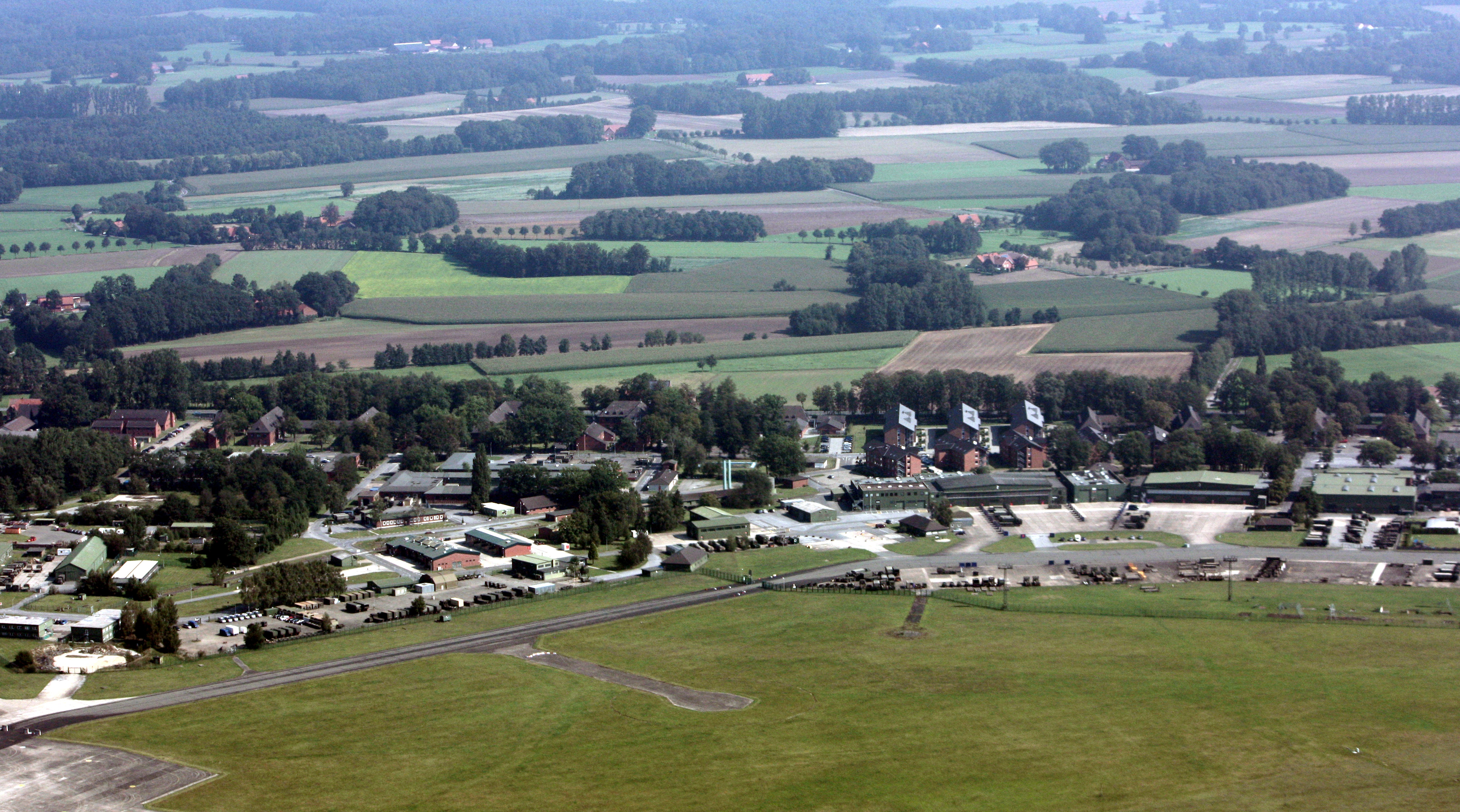 Flughafen Gütersloh, Blick Richtung Norden